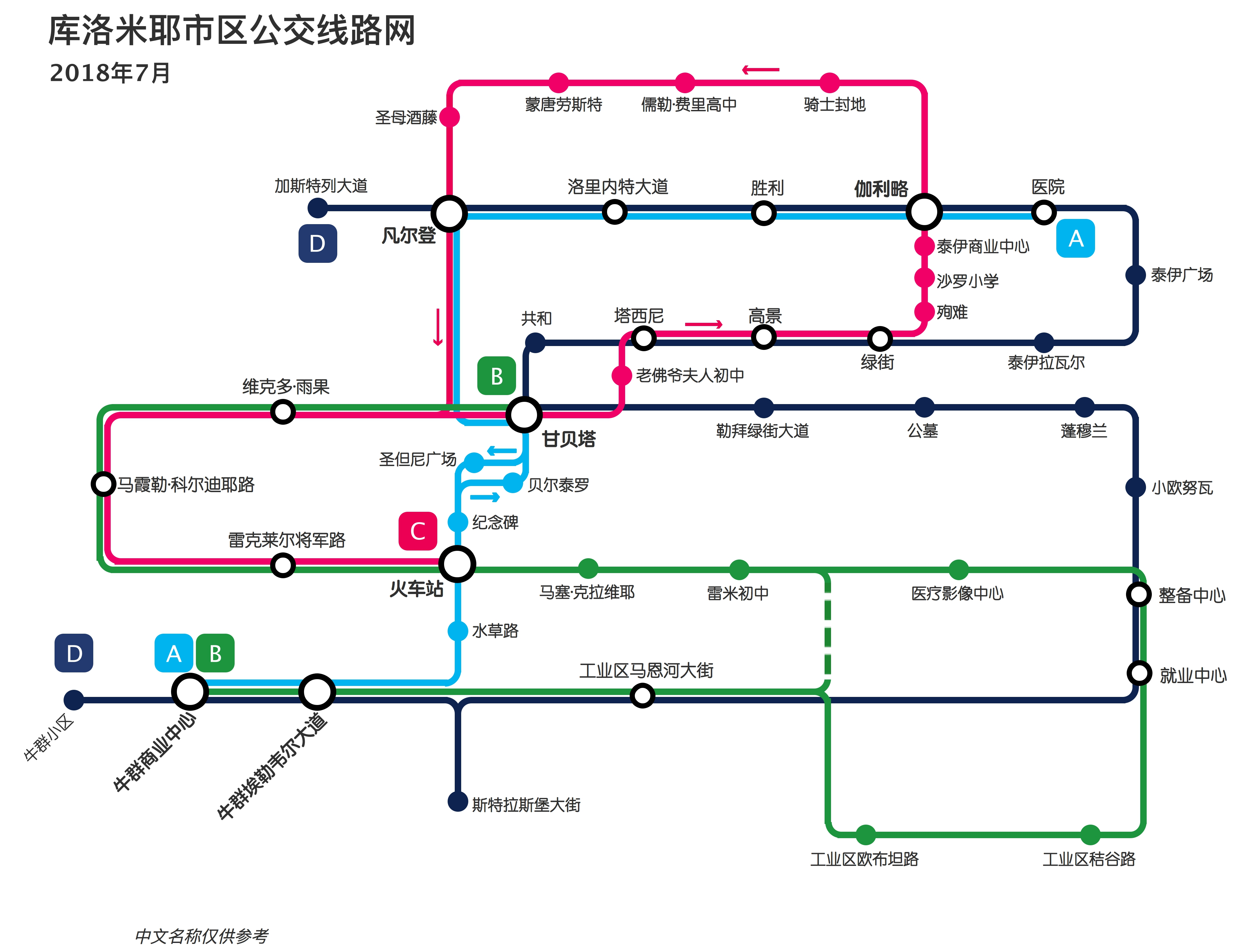 Schéma de bus Coulommiers en chinois